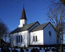 Ørland kirke i Ørland kommune, Sør-Trøndelag. Lagt ut av kommunen